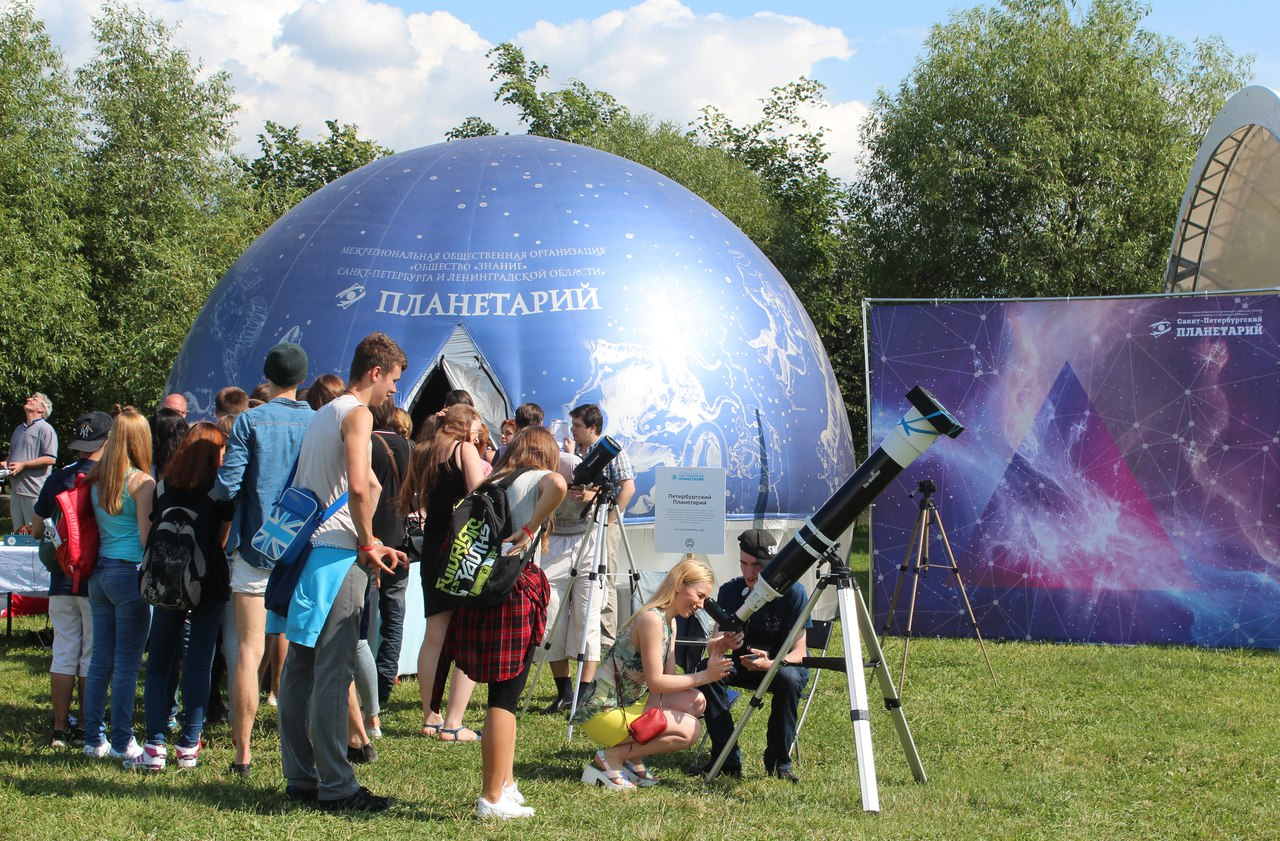 Выезд на летний фестиваль ВКонтакте 2015